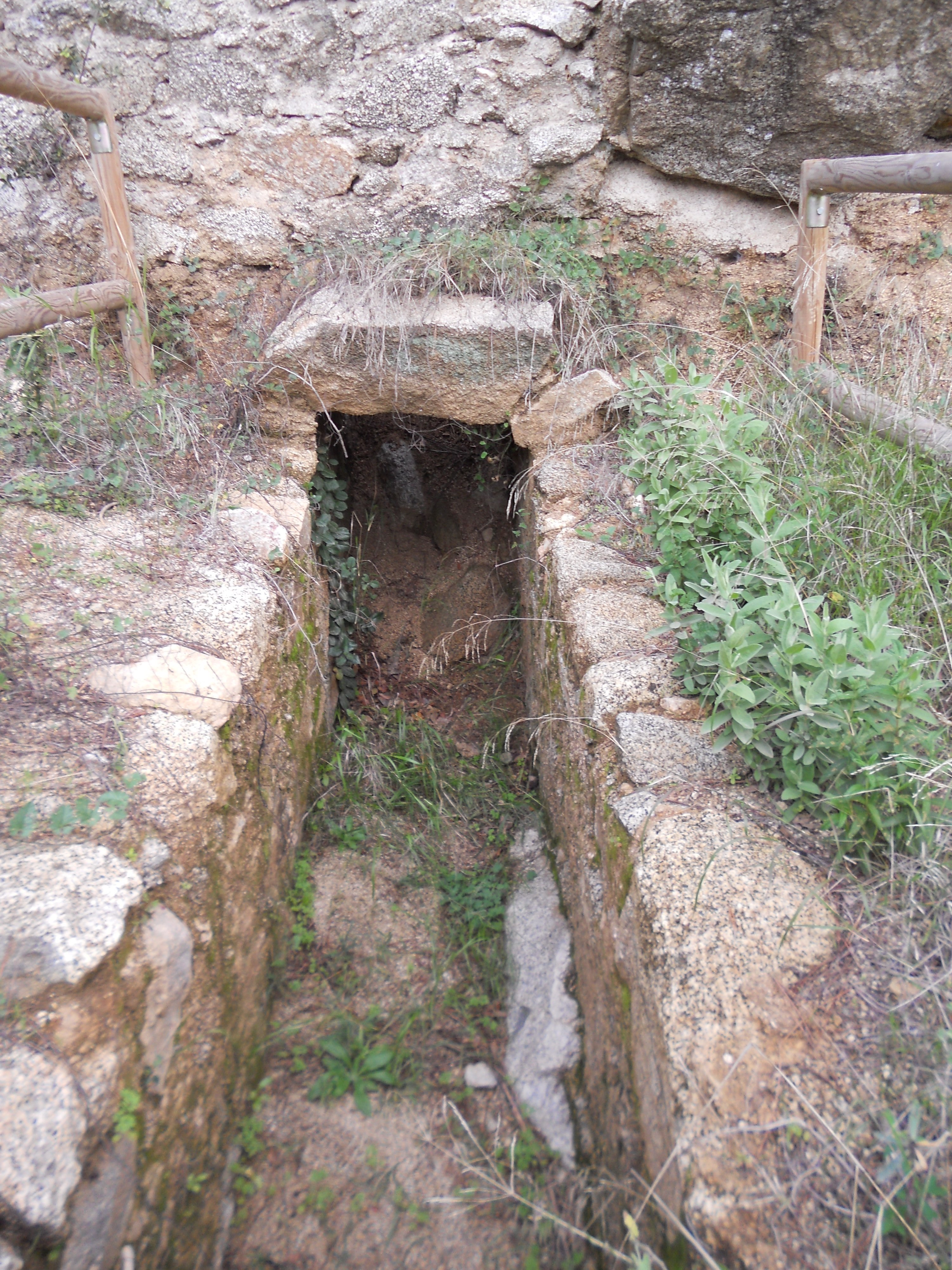 Desguàs de la via romana de Parpers, coneguda com Via Sèrgia, que anava des d'Iluro (Mataró) fins Ausa (Vic).